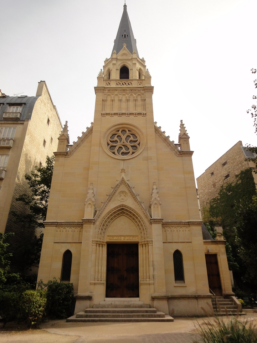 Eglise Saint-Jean Paris 75007, 2012